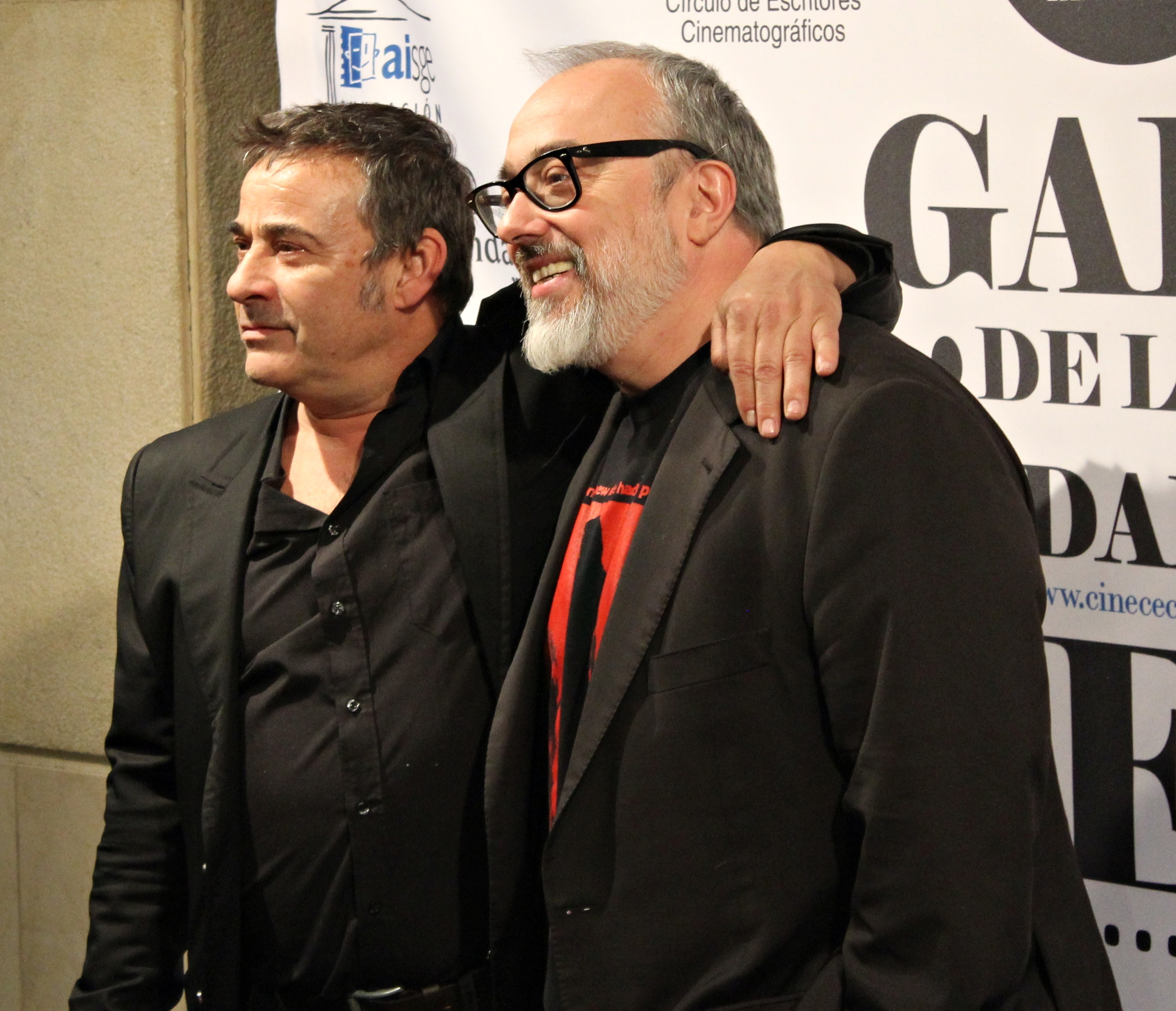 Eduard Fernández y Álex de la Iglesia, actor y director de la película española Perfectos desconocidos en la 73 edición de las Medallas del Círculo de Escritores Cinematográficos.